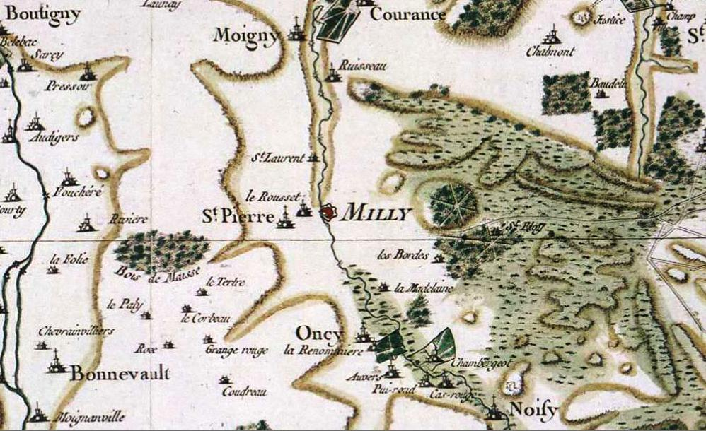 Carte de Milly-la-Forêt (91) selon Cassini au XVIIIe siècle